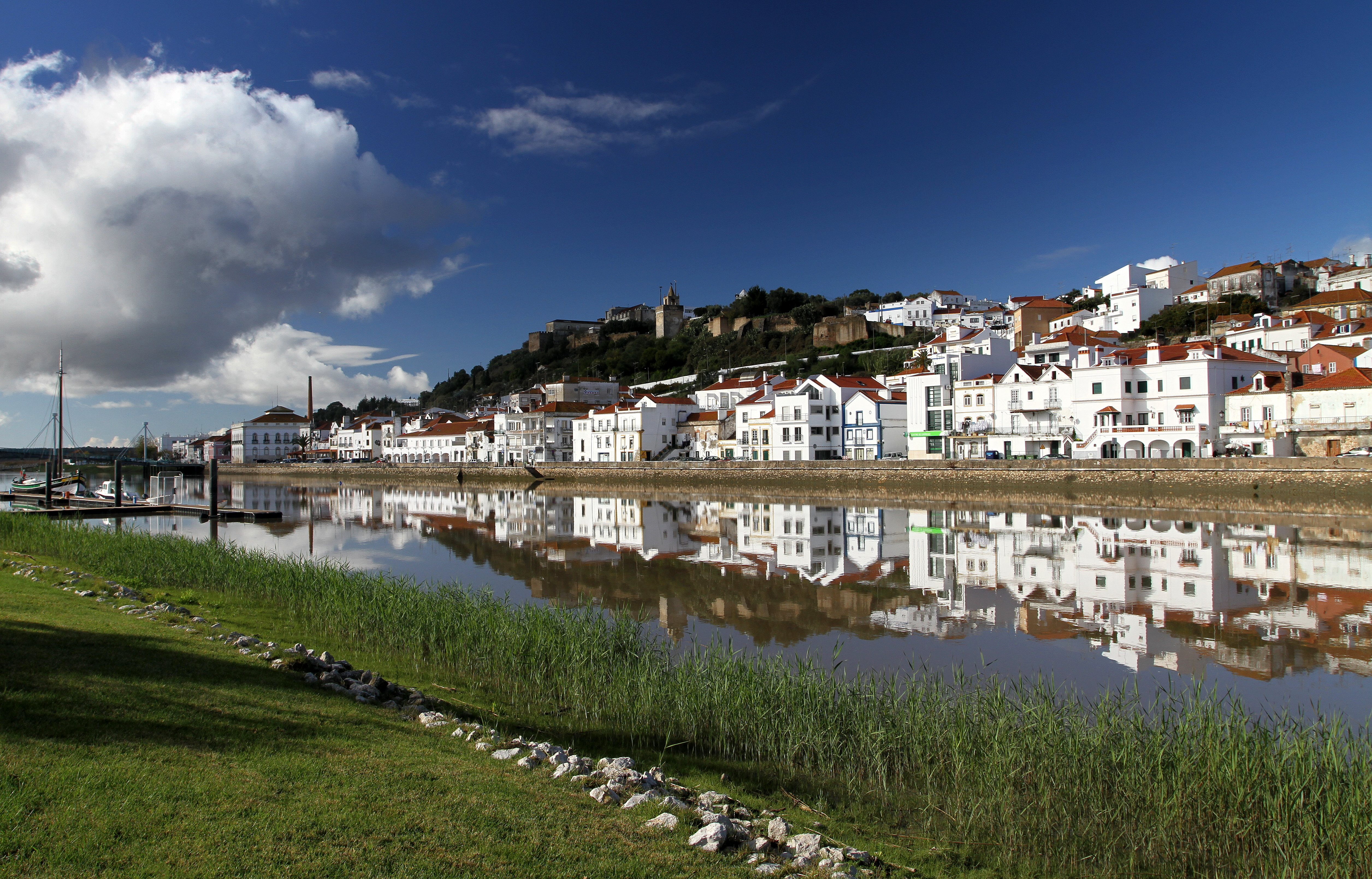 Castelo de Alcacer do Sal após uma chuvada This file was uploaded for Wiki Loves Monuments in Portugal with the unique identifier 70159.